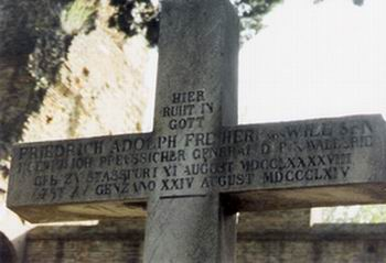 Grabkreuz F.Adolf von Willisen